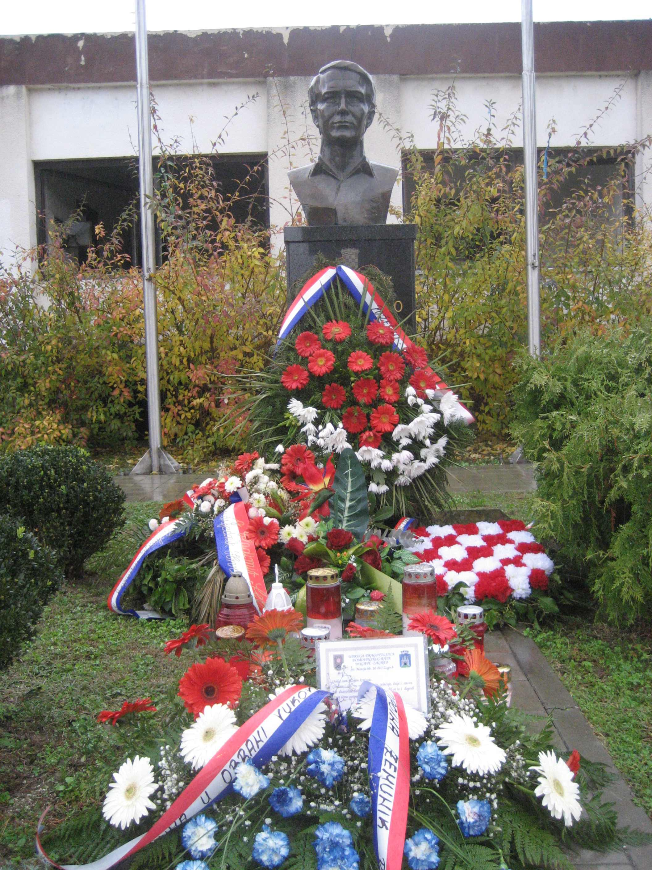 Blago Zadro Memorial in Vukovar, Croatia